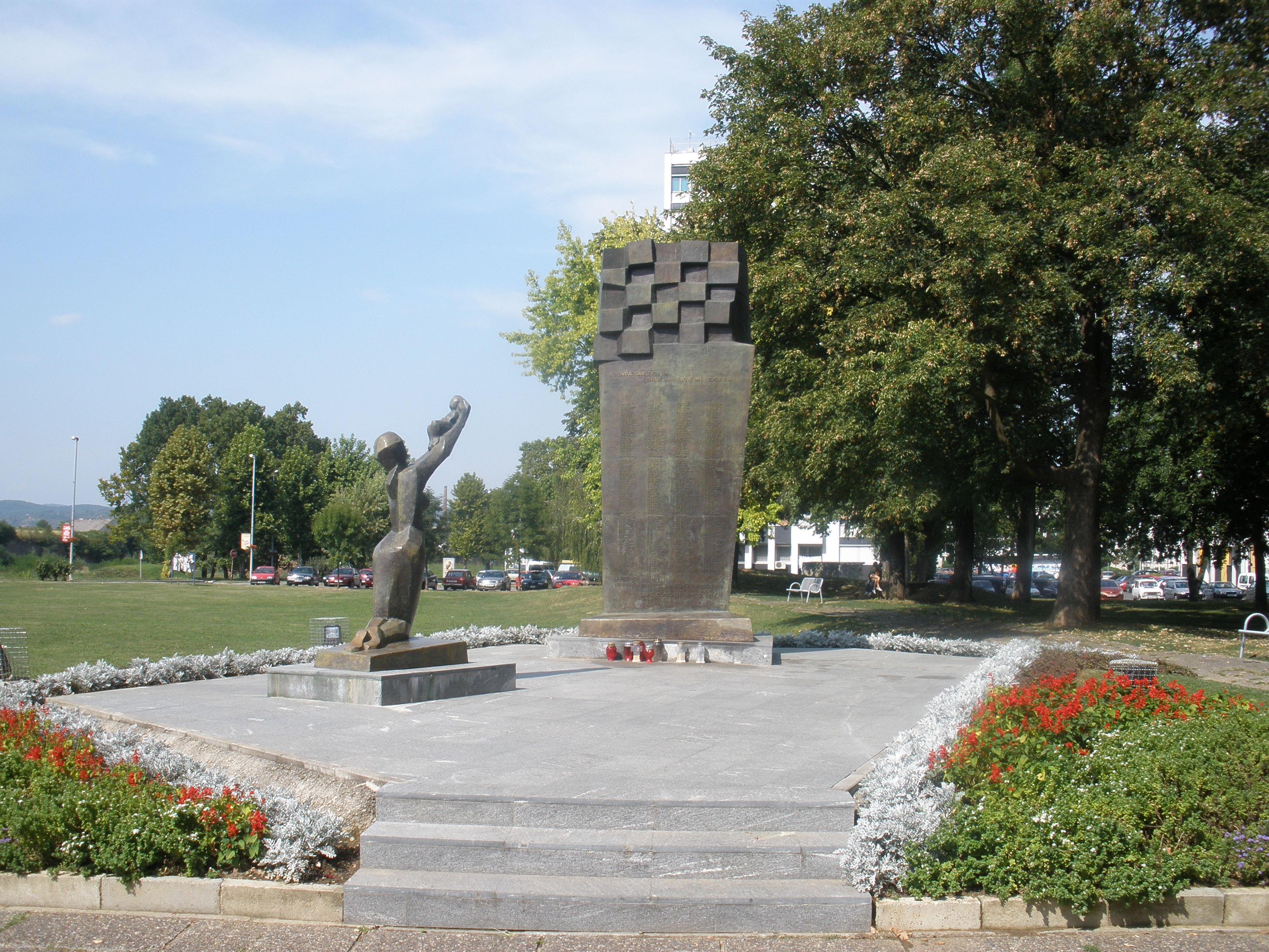 Spomenik poginulim braniteljima u Domovinskom ratu u Slavonskom Brodu.